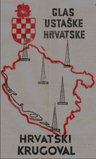 Promidžbeni plakat za hrvatski krugoval, državni radio u NDH